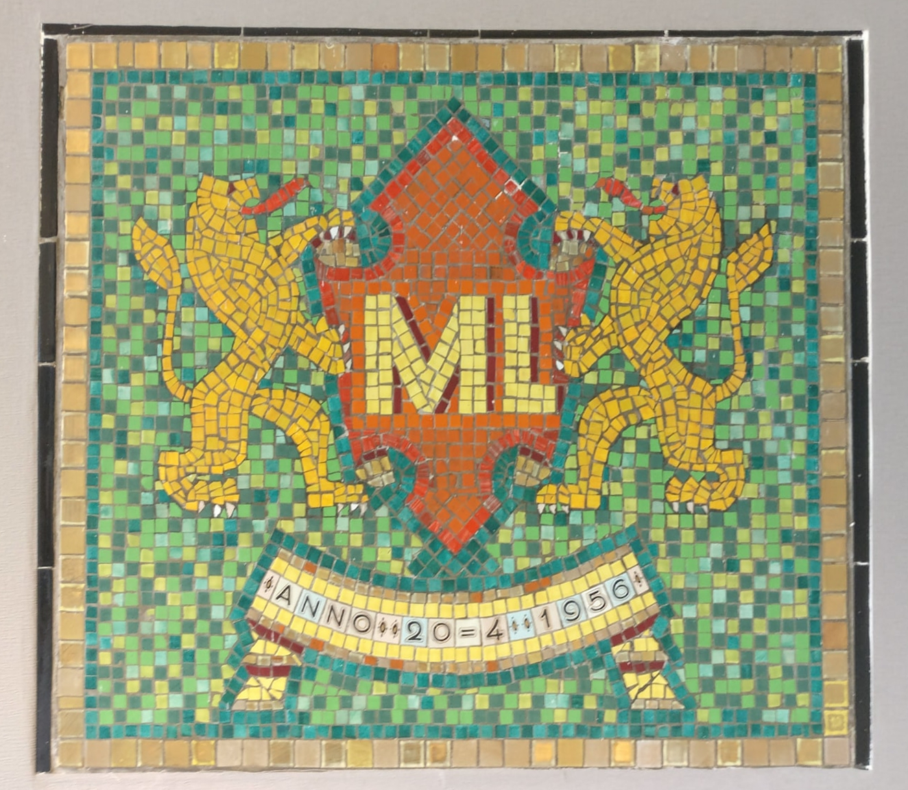 Tegel